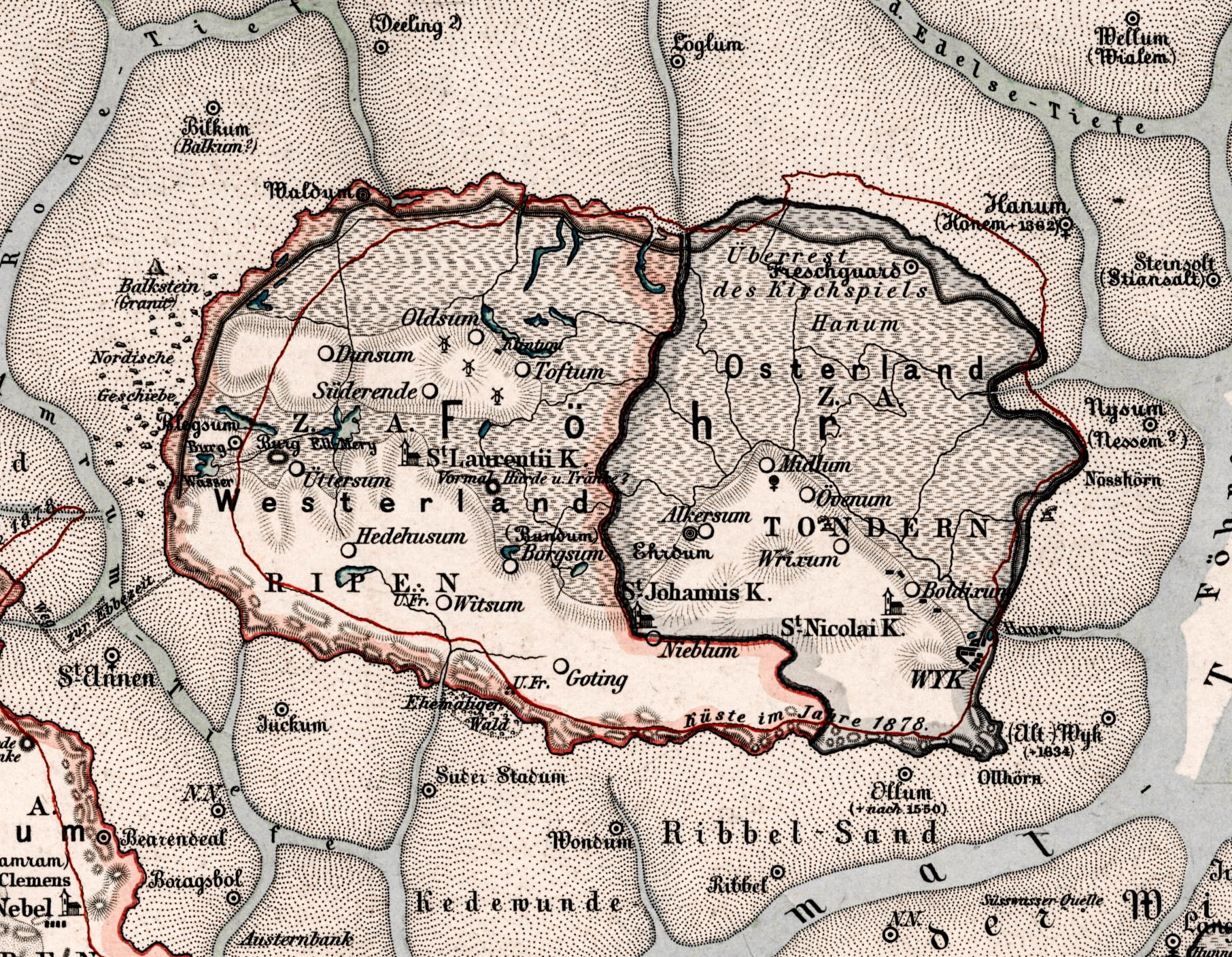 Historische Karte von den Nordfriesischen Inseln Nordstrand, Pellworm, Amrum, Föhr, Sylt etc. der continentalen Marsch zwischen Hever und Königsau, sowie der Friesischen Vorgeest. Redigirt für die Zeit von 1643 bis 1648, mit besonderer Berücksichtigung der vor dem Jahre 1643 untergegangenen Köge, Kirchen, Ortschaften etc.